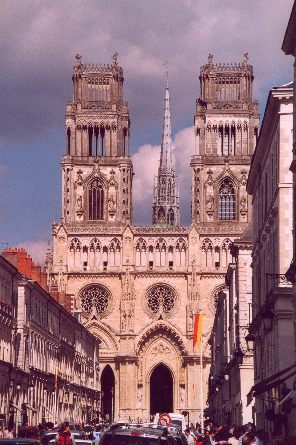 Orléans, Cathédrale